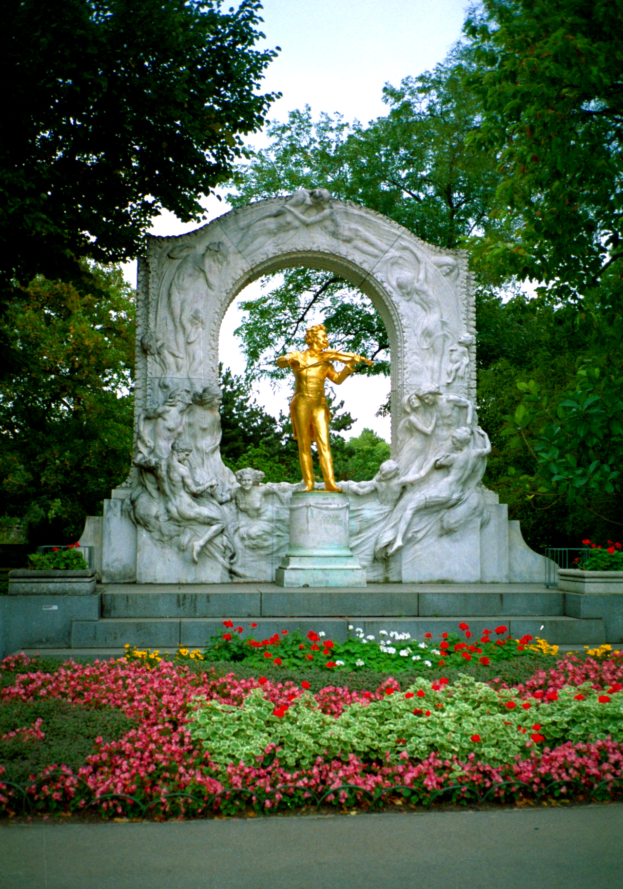 Johan Strauss Jr statue at the Stadtpark, Vienna